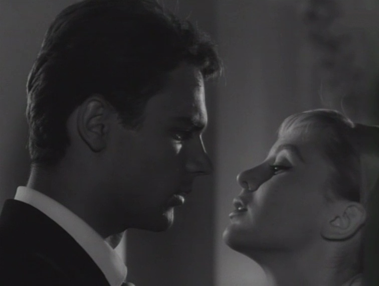 Fotogramma del film Lazzarella (1957)